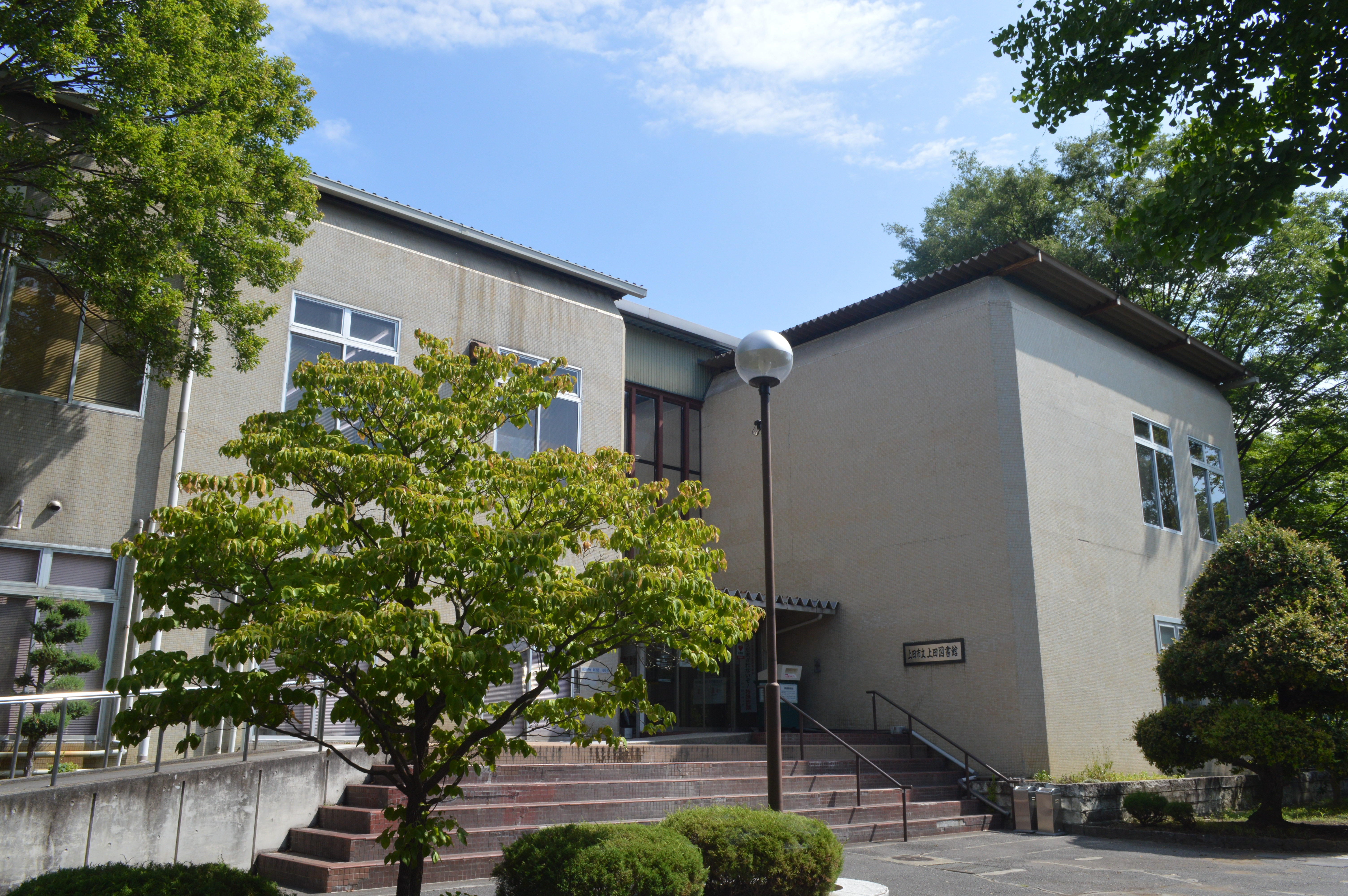 上田市立図書館の本館である上田市立上田図書館。